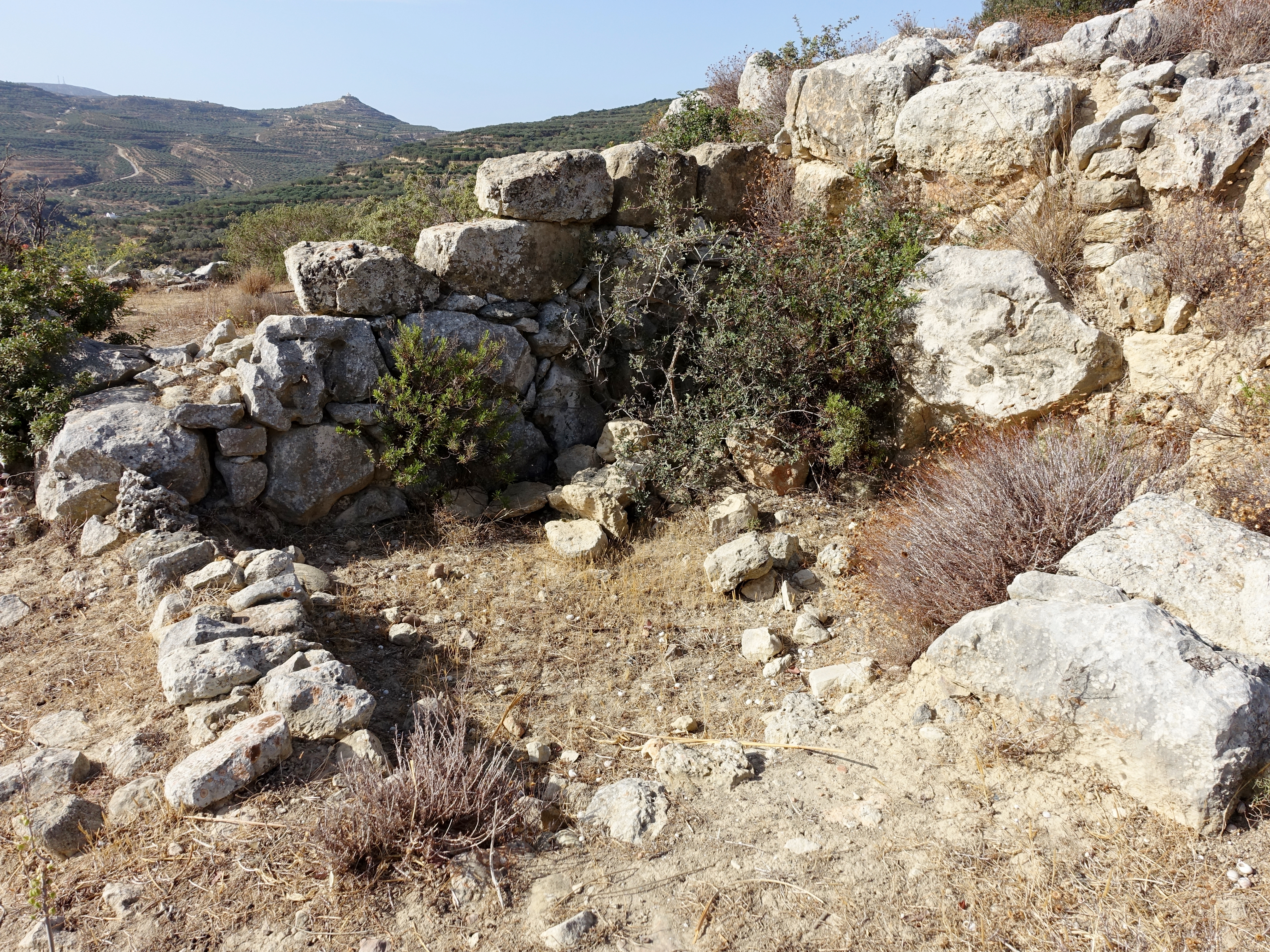 Minoischen Villa von Agios Georgios (Άγιος Γεώργιος), Gemeinde Sitia, Kreta, Griechenland